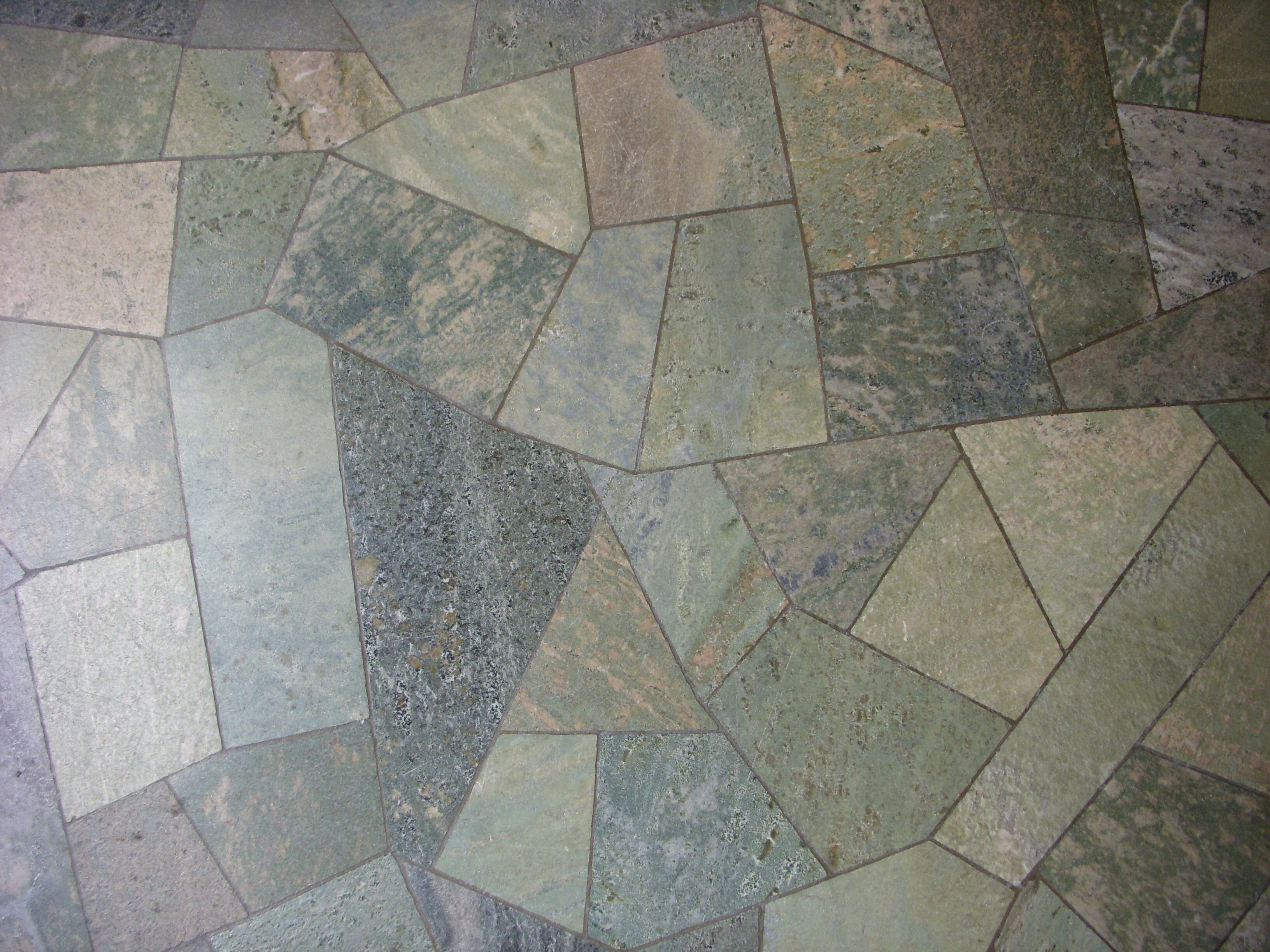 Kolmårdsmarmor i Stockholms stadshus (entrétrappa till tornet)